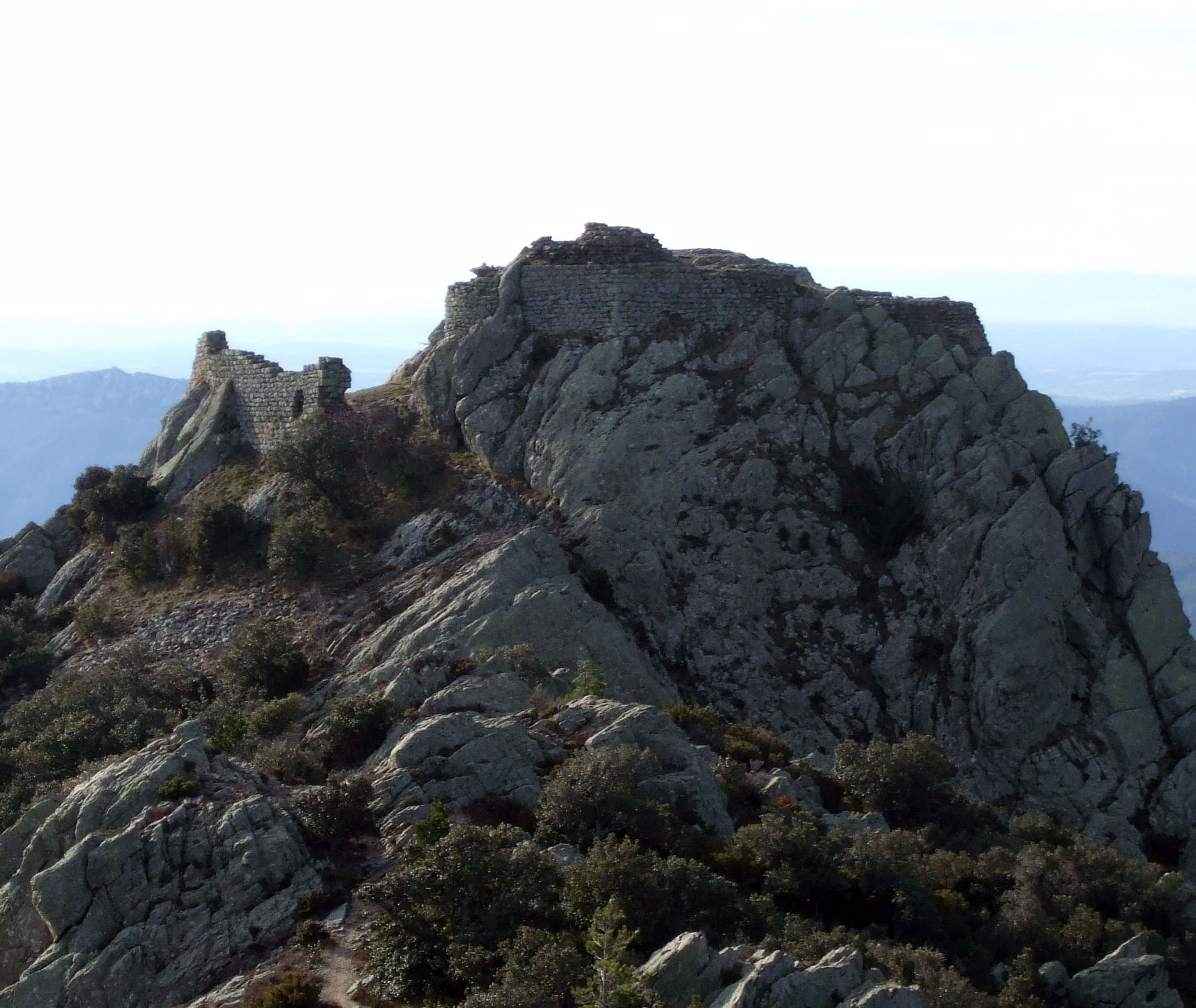 Ruïnes del castell de Cabrera